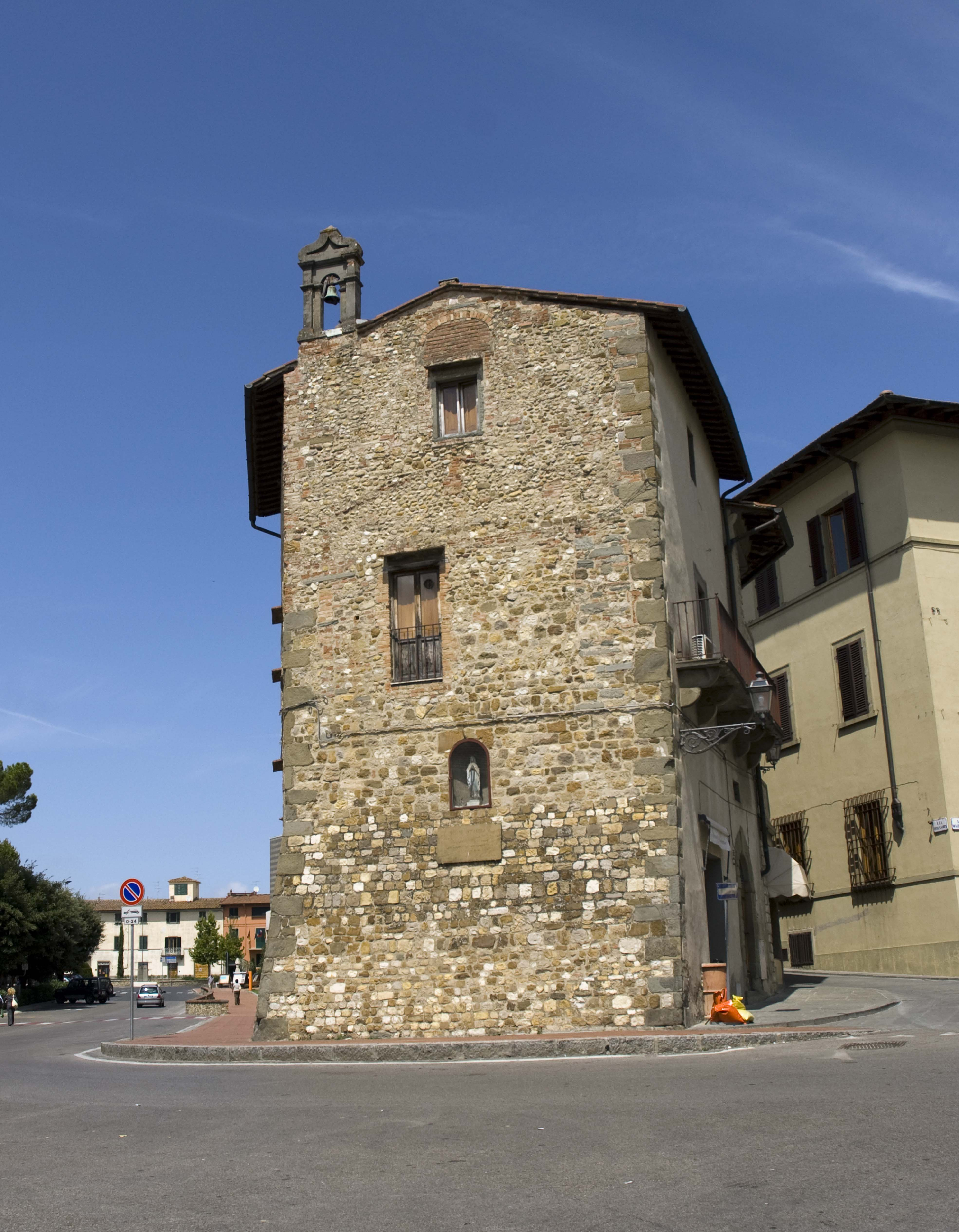 Bastione della ex-Porta senese - San Casciano in Val di Pesa